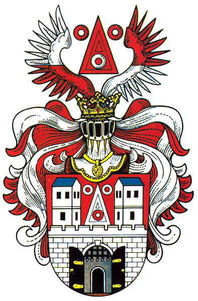 Znak města Planá u Tachova